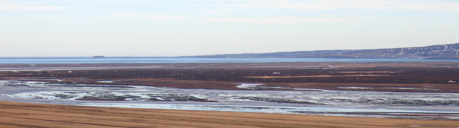 Skjálfandafljót. Taken by Gestur Pálsson in april 2005